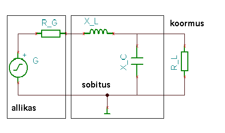 L-ahel LC. Tehtud TinaSpice'i abiga.